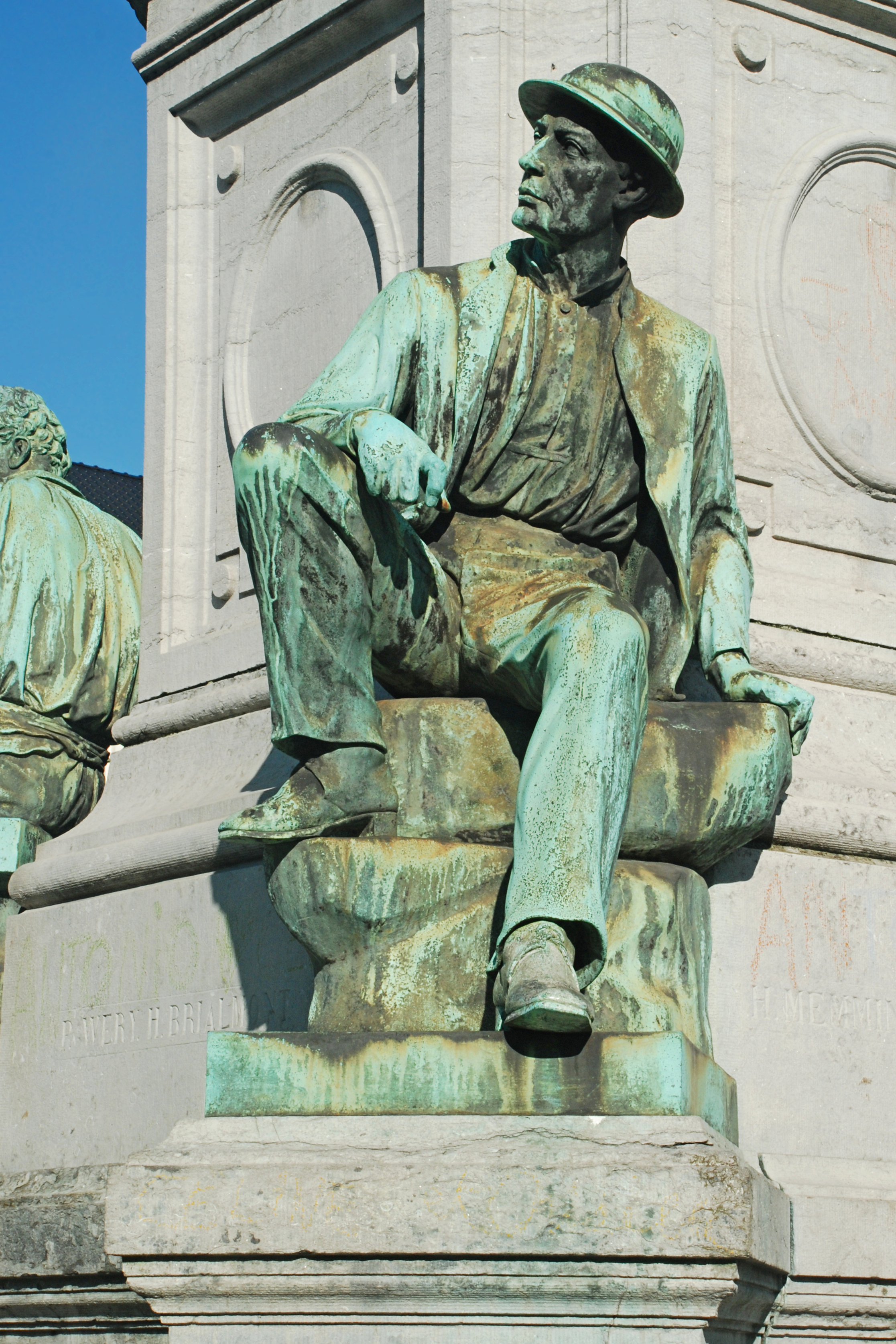 Belgique - Bruxelles - Ixelles - Place du Luxembourg - Monument à John Cockerill (1872) - le houilleur This photo of immovable heritage has been taken in the Brussels Capital Region